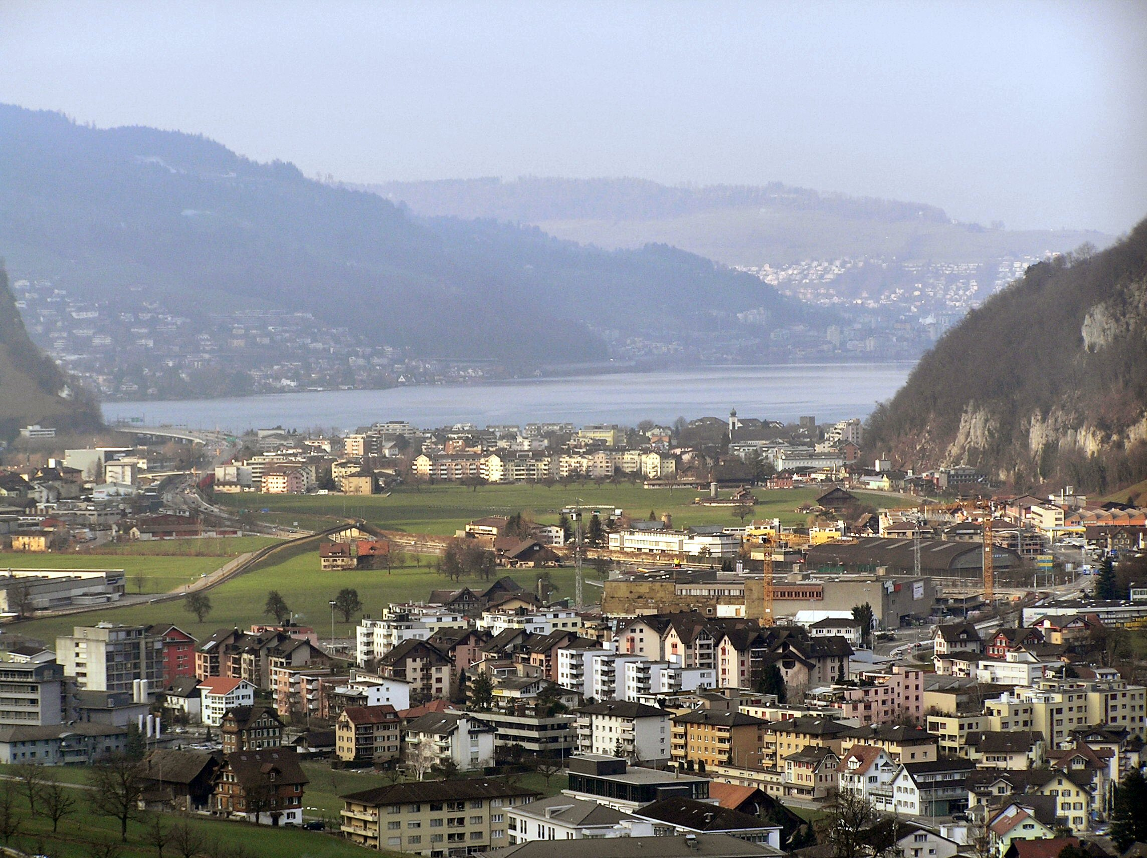 Stansstad am Vierwaldstättersee, aufgenommen vom Fuße des Stanserhorns. Im Vordergrund vor der Autobahn A2 ist der Westen von Stans zu sehen, links unten im Bild das Kantonsspital Nidwalden. Auf der anderen Seite des Vierwaldstättersees liegen Hergiswil (links) und Horw bei Luzern (rechts).